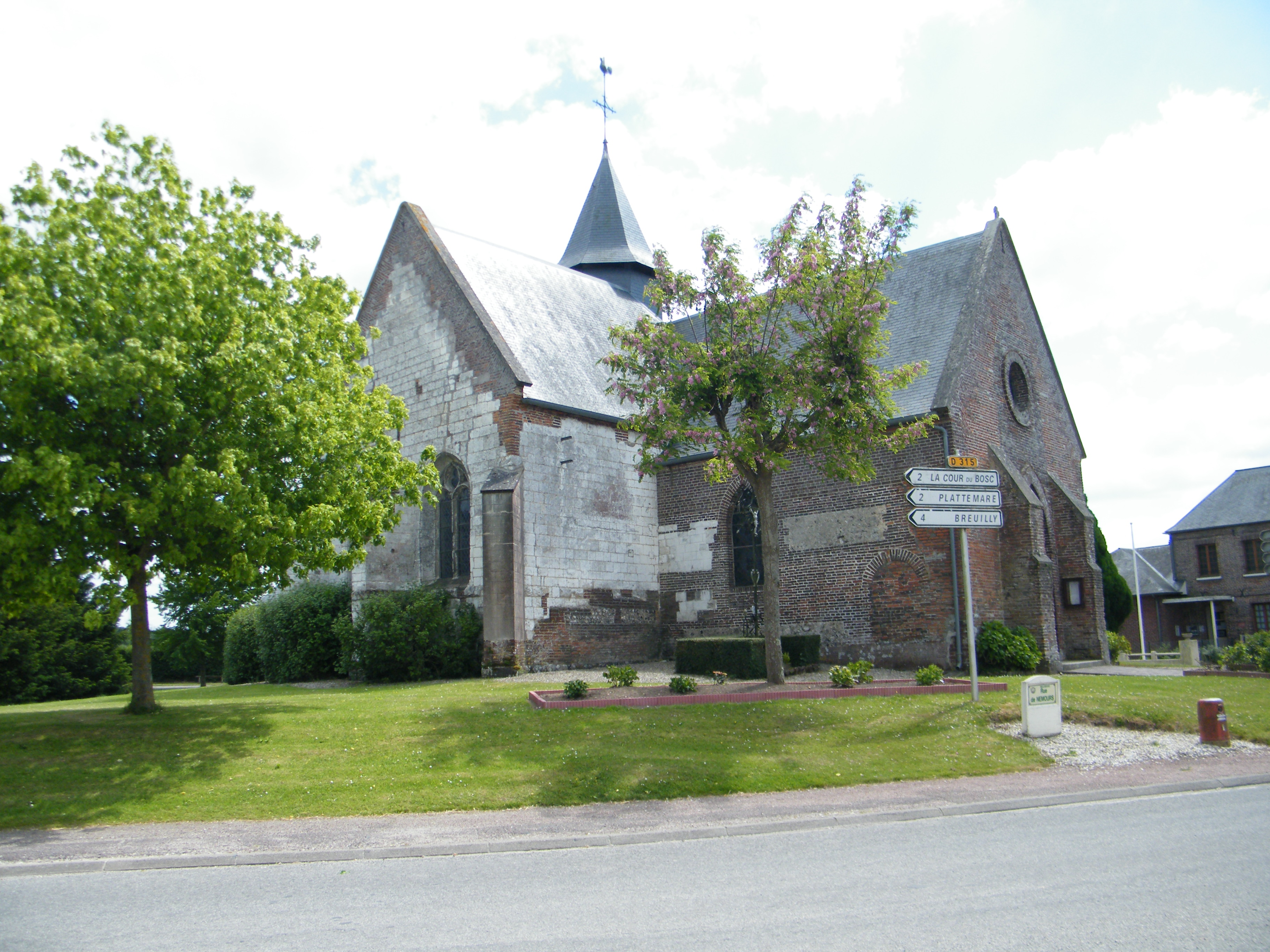 L'église.